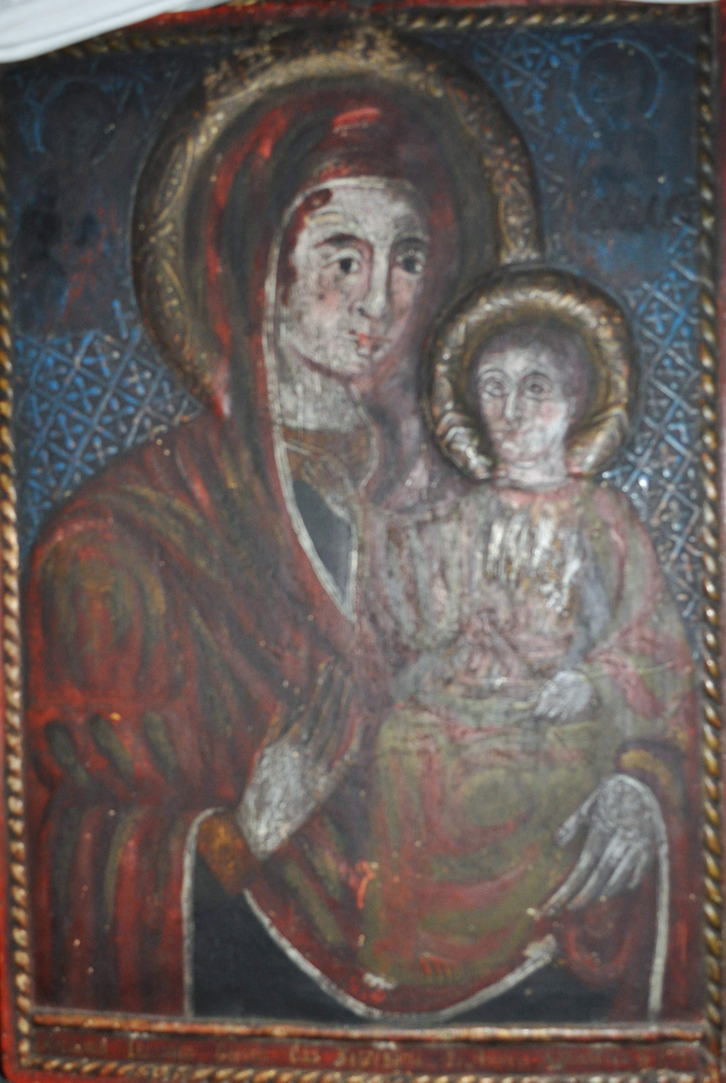 Biserica de lemn din Nadășu, județul Cluj